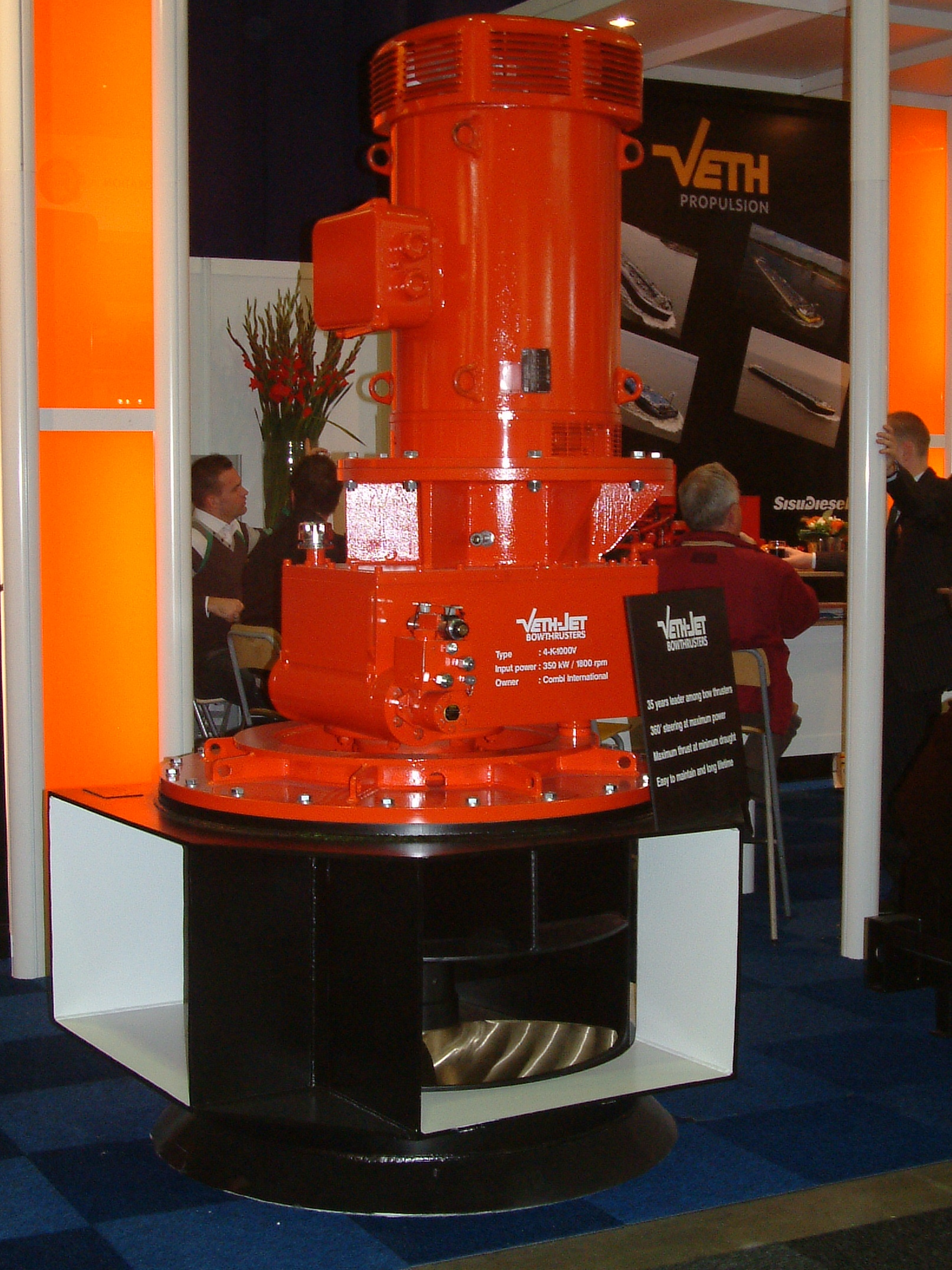 Europort 2009